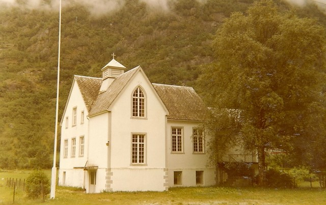 Ljosheim kapell